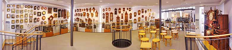 Deutsches Uhrenmuseum, Saal mit Schwarzwalduhren und Turmuhren, 2011